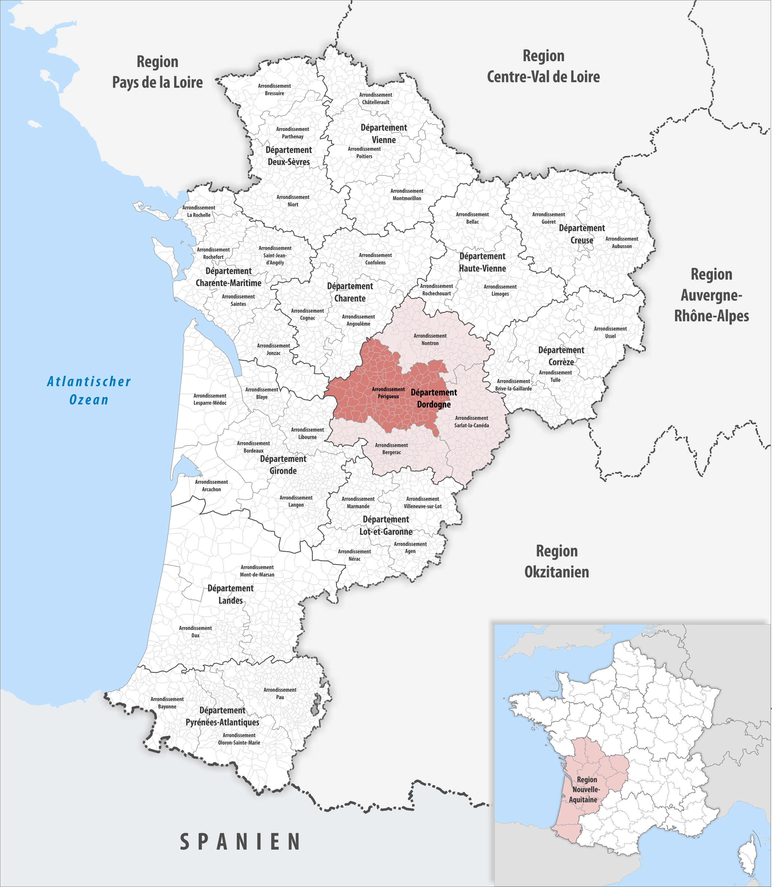 Lage des Arrondissements Périgueux